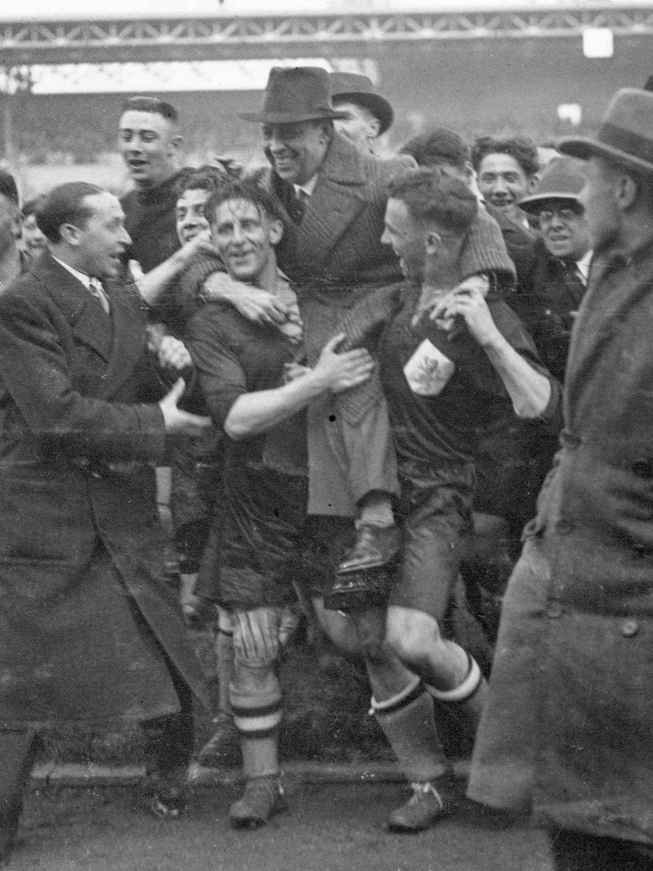 NVB-official Karel Lotsy door de spelers van het veld gedragen. Nederland - Ierland (5-2), gespeeld op 8 april 1934 in het Olympisch Stadion te Amsterdam.